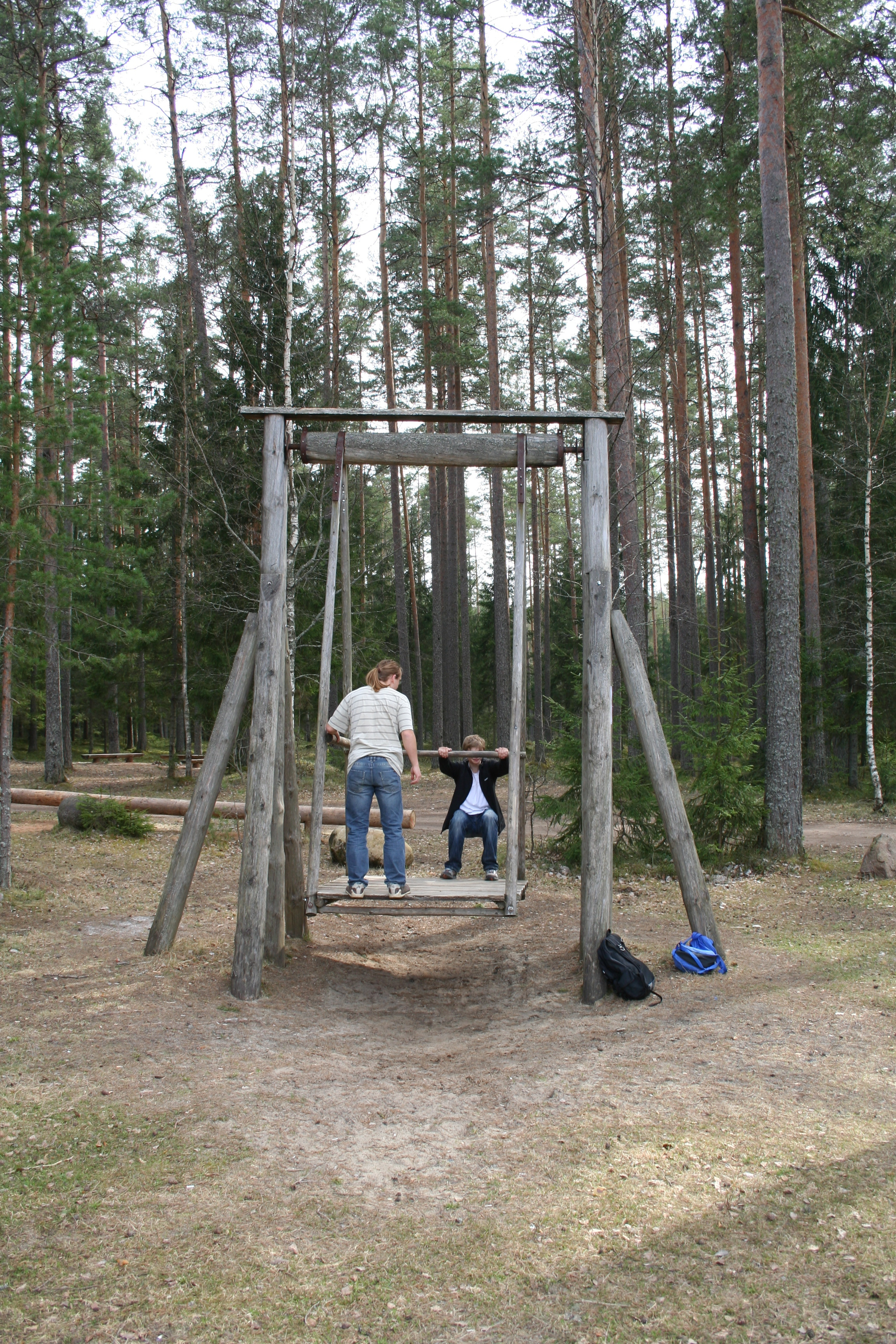 Palojärv (Suur Palojärv, Ihamaru Palojärv), kiik suplemisrannal